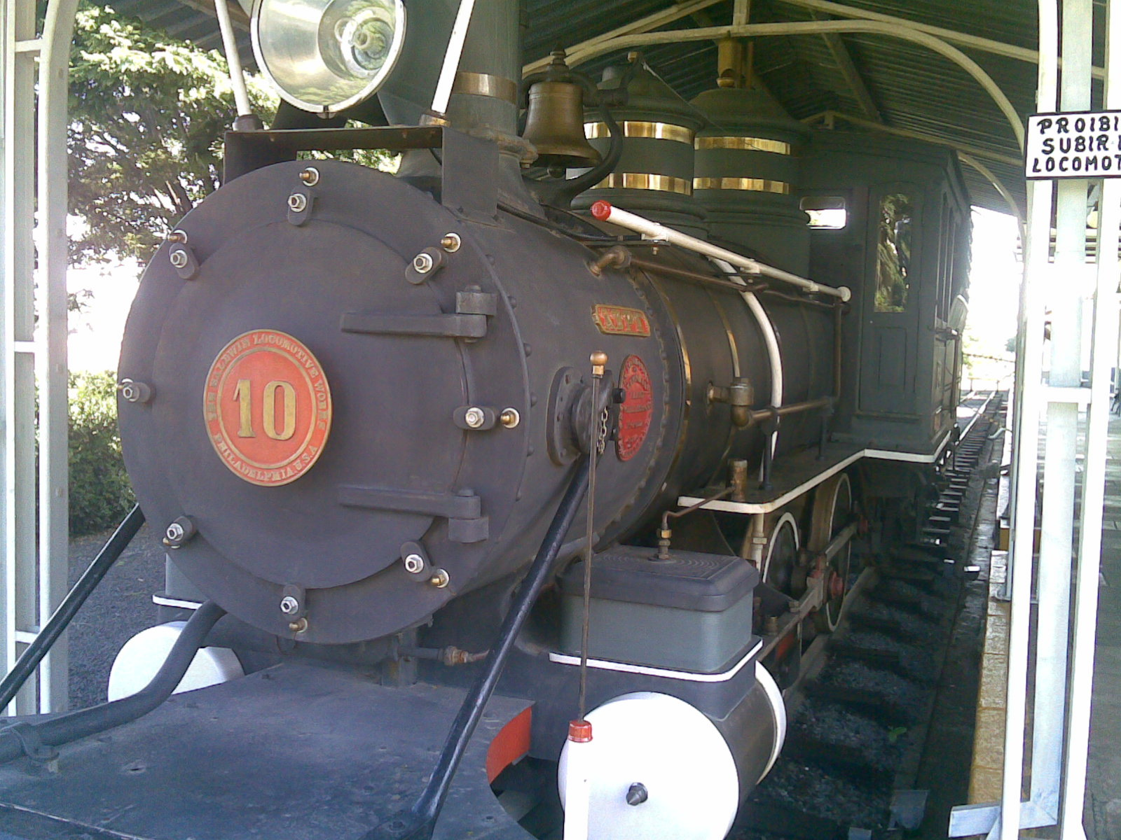 Locomotiva número 1 da Ytuana no Museu Ferroviário de Indaiatuba.